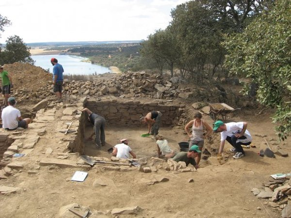 Área doméstica